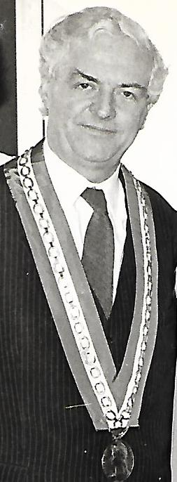 André Delelis, homme politique français, Maire de Lens, député socialiste du Pas-de-Calais, ministre du Commerce et de l'Artisanat des deux premiers gouvernements Mauroy.